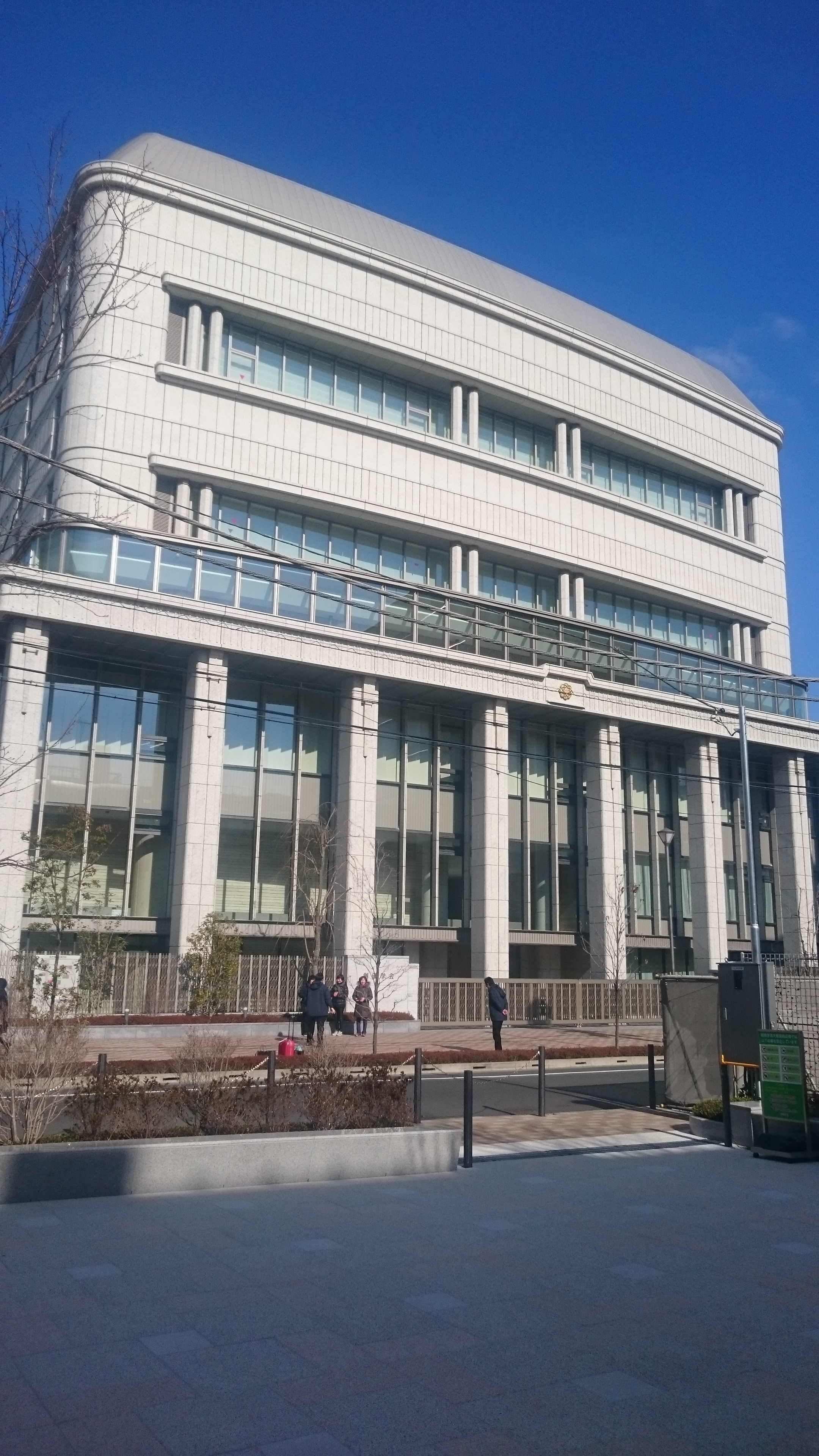 広宣流布大誓堂 外観